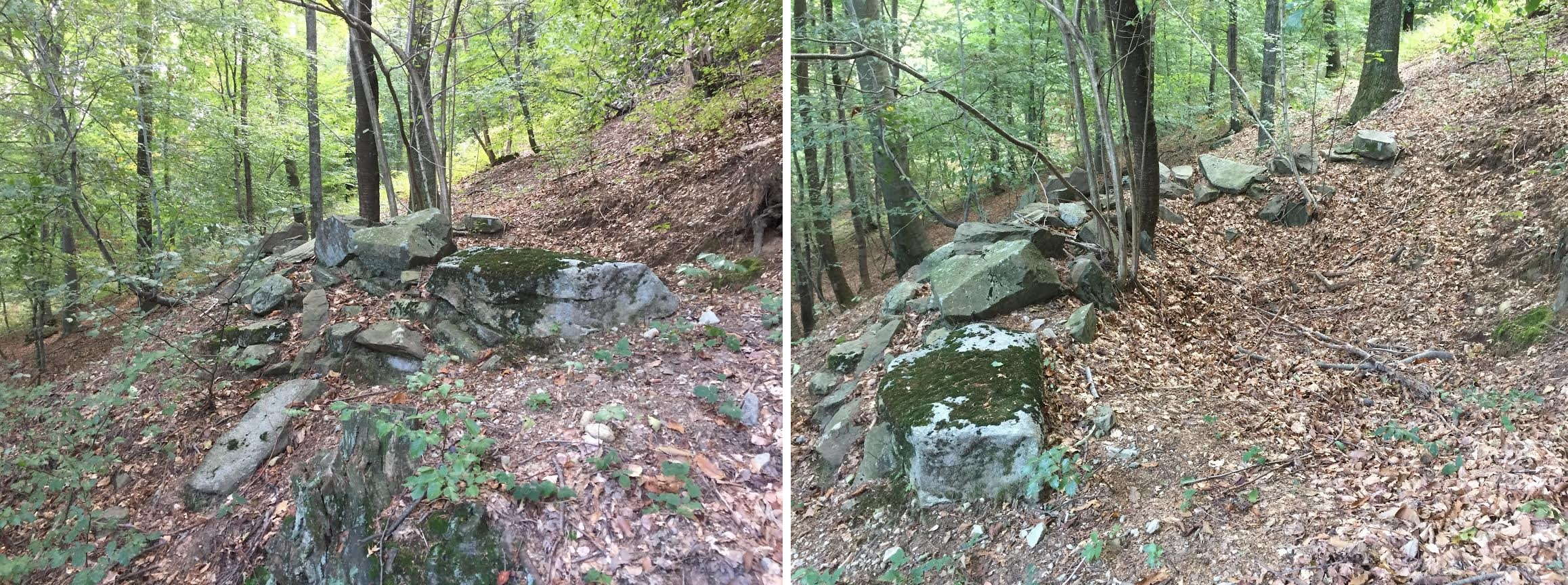 I resti di una delle trincee usate dall'esercito italiano per effettuare esercitazioni nel 1948 (località Pardom, comune di Brinzio - VA). La foto affianca la vista inferiore (che evidenzia i sassi posti a riparo) a quella superiore (ove si nota l'avvallamento).